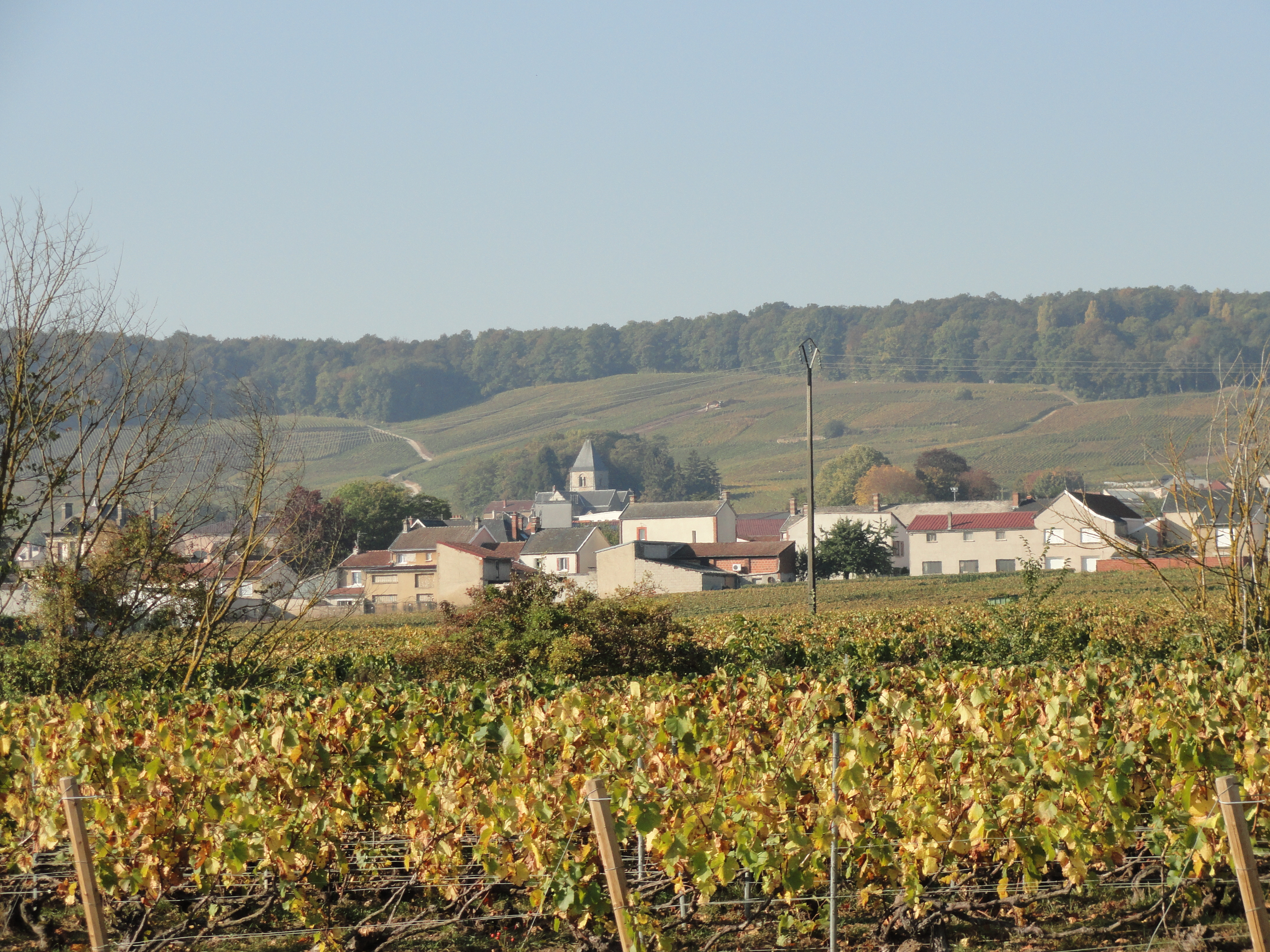 Vue du Mesnil-sur-Oger depuis la route départementale 9